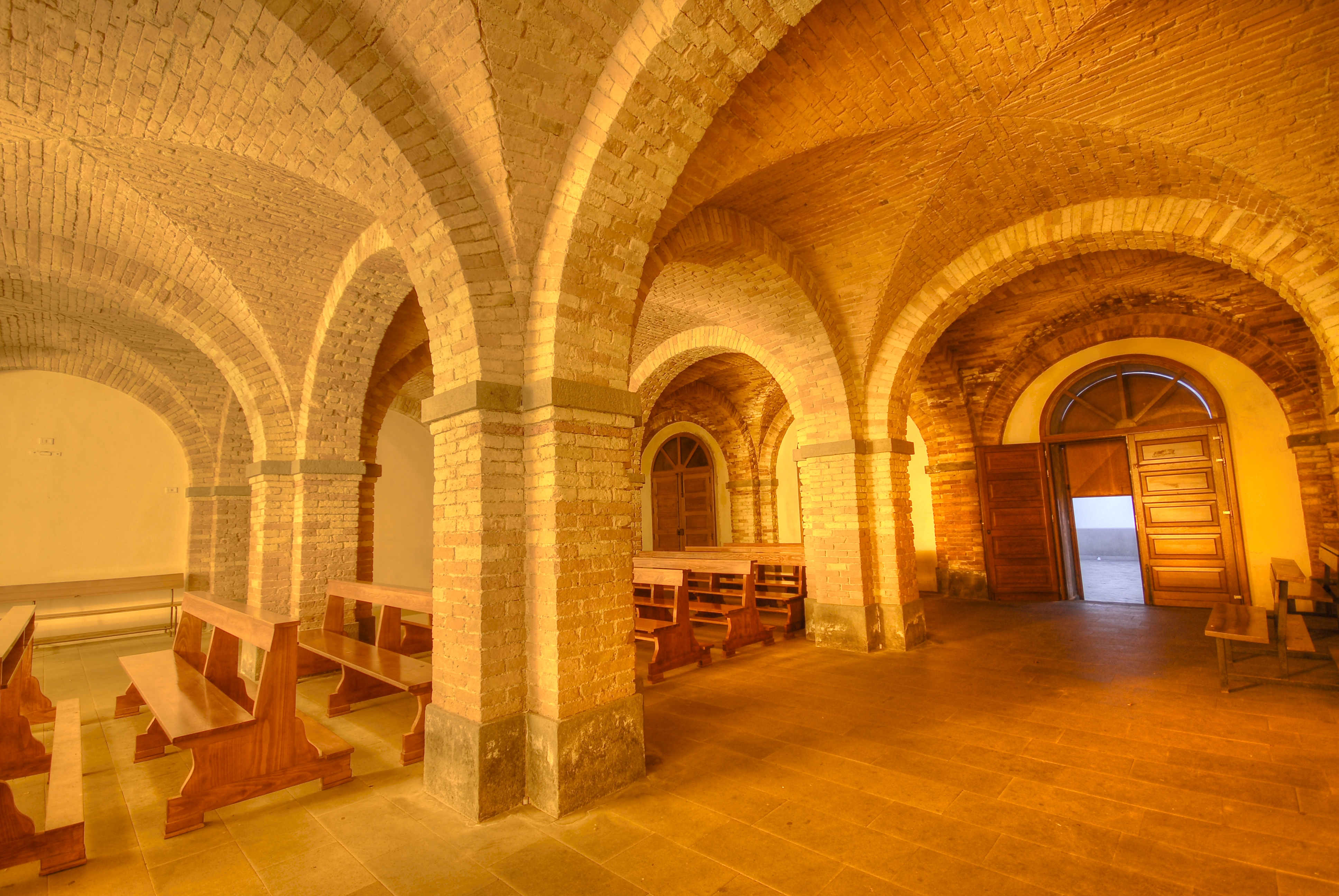 inside the church